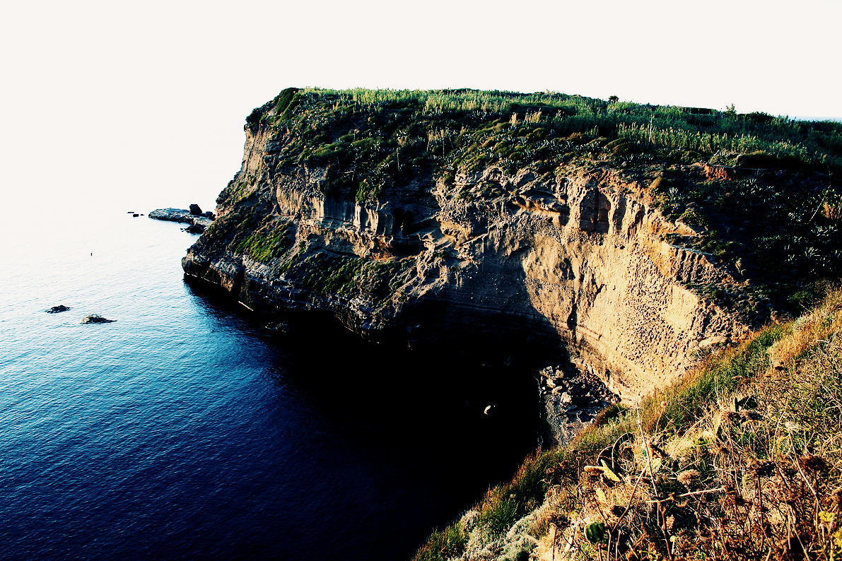 La costa di Ventotene. Scogliera dell'Isola di Ventotene.